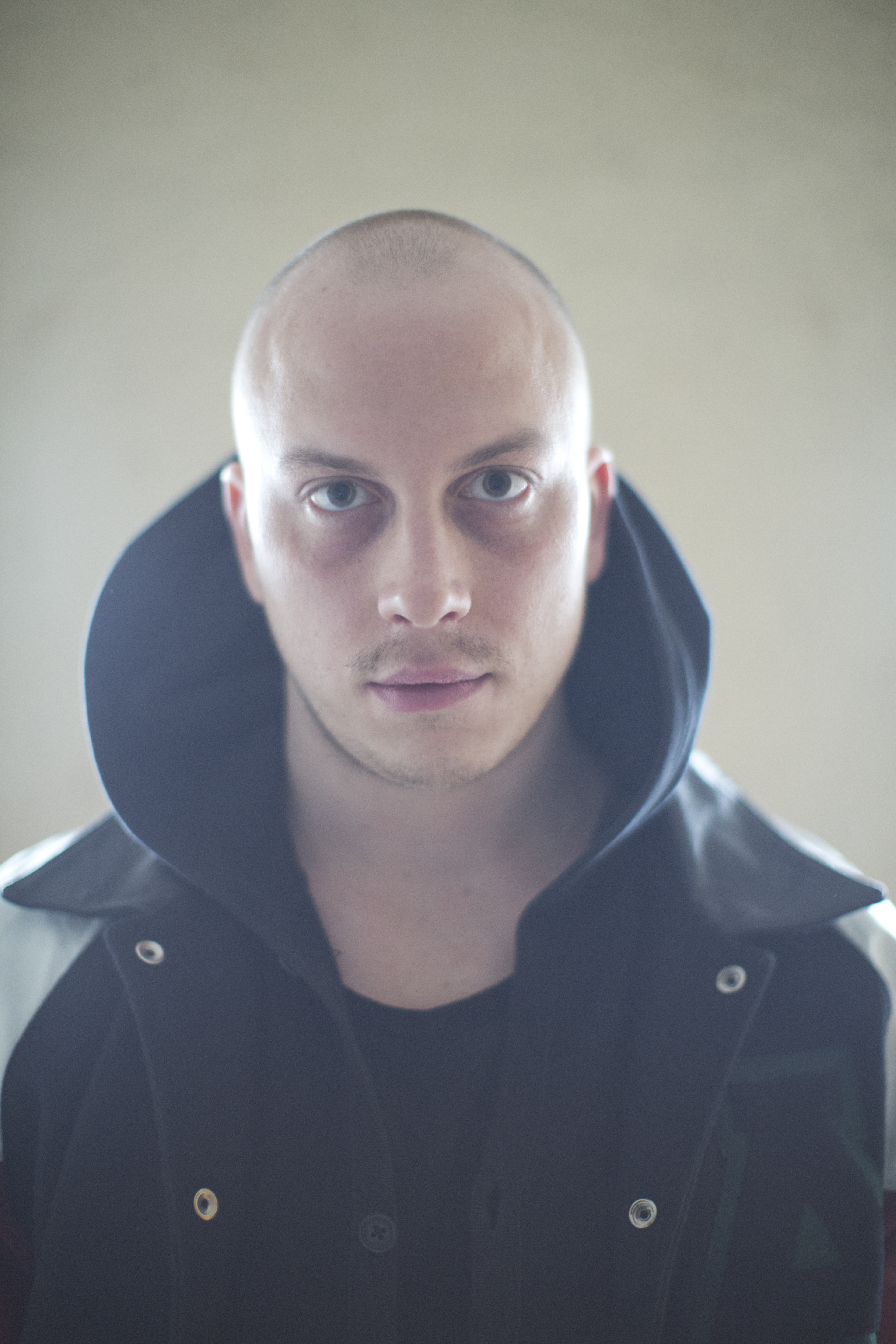 Magnus